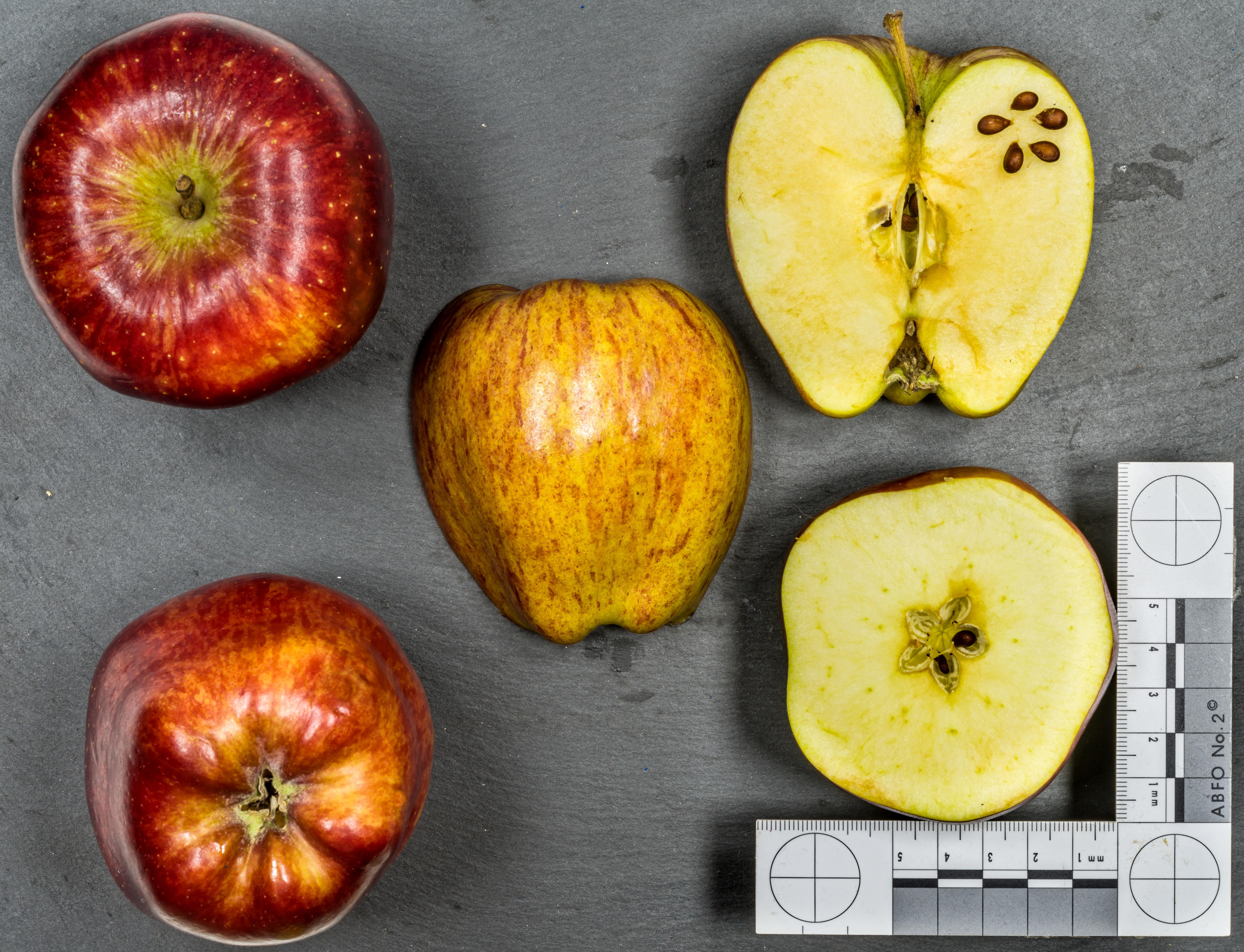 Apfelsorte: Red Chief , Mutation von Red Delicious